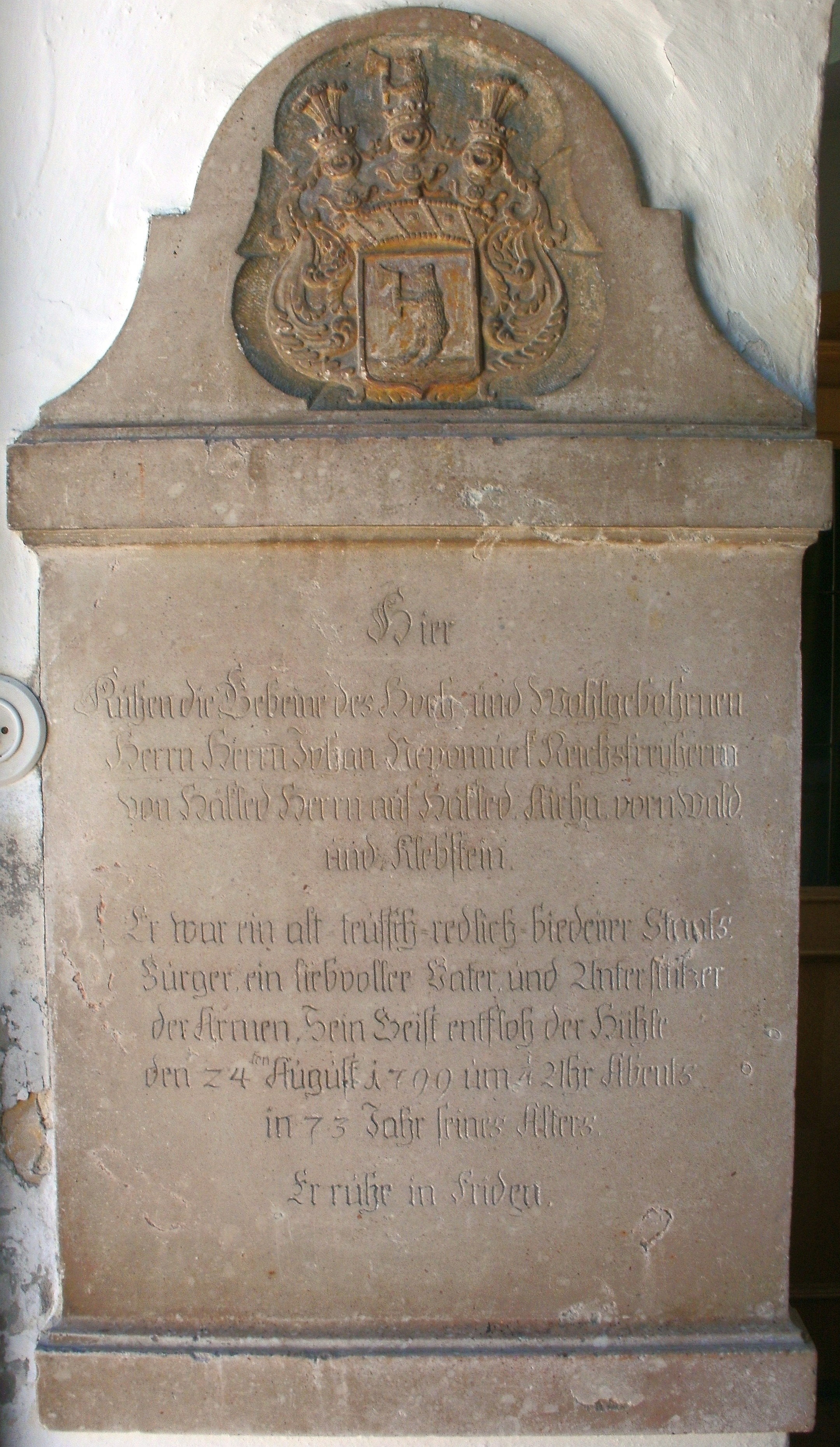 Grabdenkmal Johann Nepomuk von Hackledt (+ 1799) in der Pfarrkirche von Sankt Marienkirchen bei Schärding. Eine wissenschaftliche Bearbeitung liegt vor in SEDDON Christopher R., Die inschriftlichen Denkmäler der Herren und Freiherren von Hackledt. Grablegen, Memoria und Repräsentation eines Innviertler Landadelsgeschlechtes, Wien (Dipl. Arb.) 2002, S. 207-209.